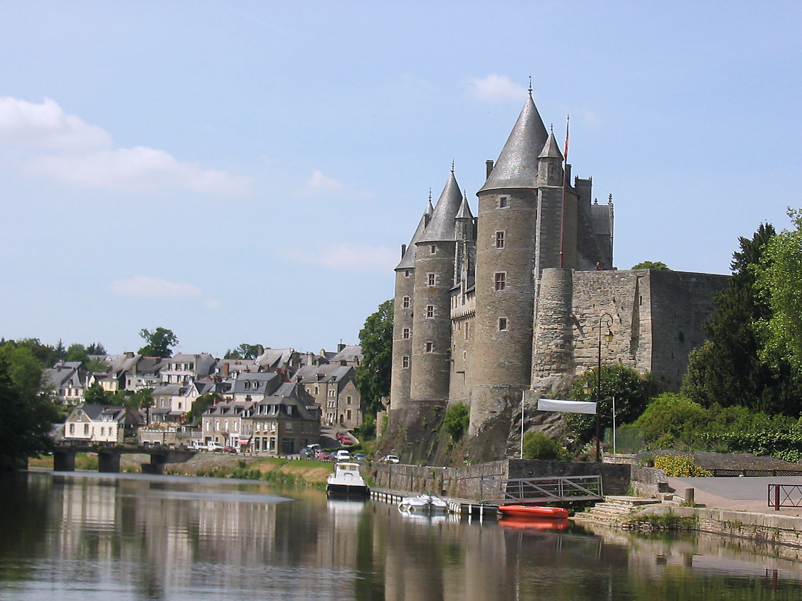 Die Burg von Josselin hoch über dem Fluss Oust, Bretagne, Frankreich